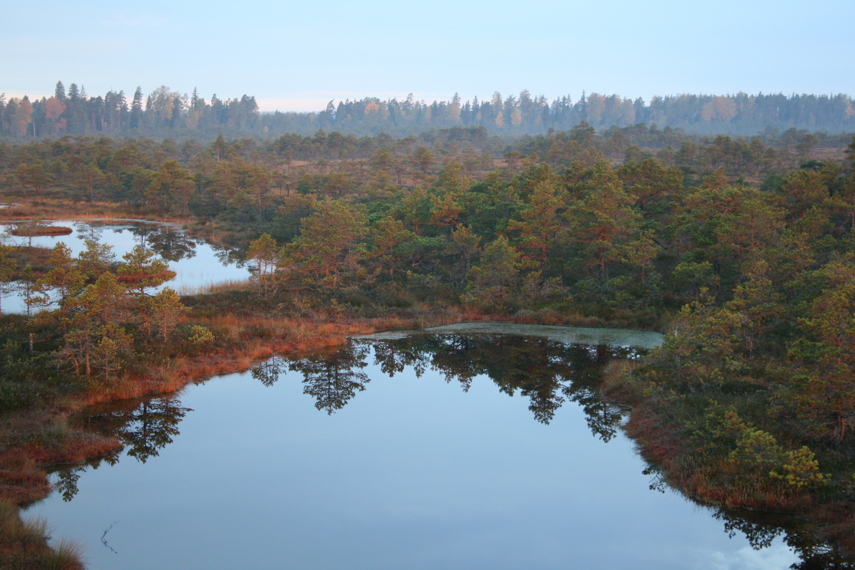 Järvamaa, Seli raba